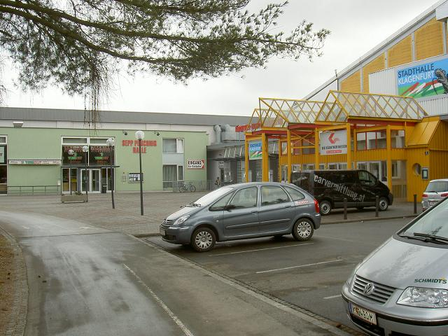 Stadthalle Klagenfurt & Sepp Puschnig Halle